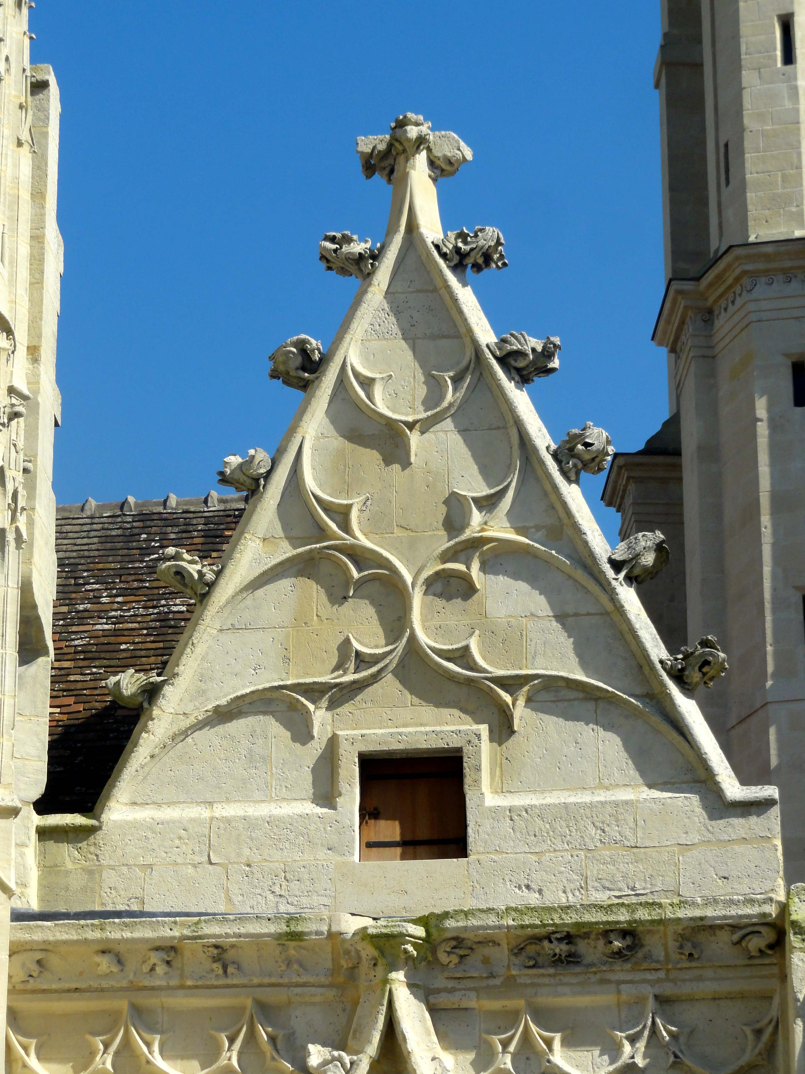 Église Saint-Pierre de Senlis - voir le titre du fichier.